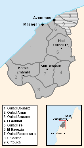 Carte des tribus Doukkala. En hachuré: Fractions "exclavées" des Chtouka et des Chiadma traditionnellement alliées des Doukkala